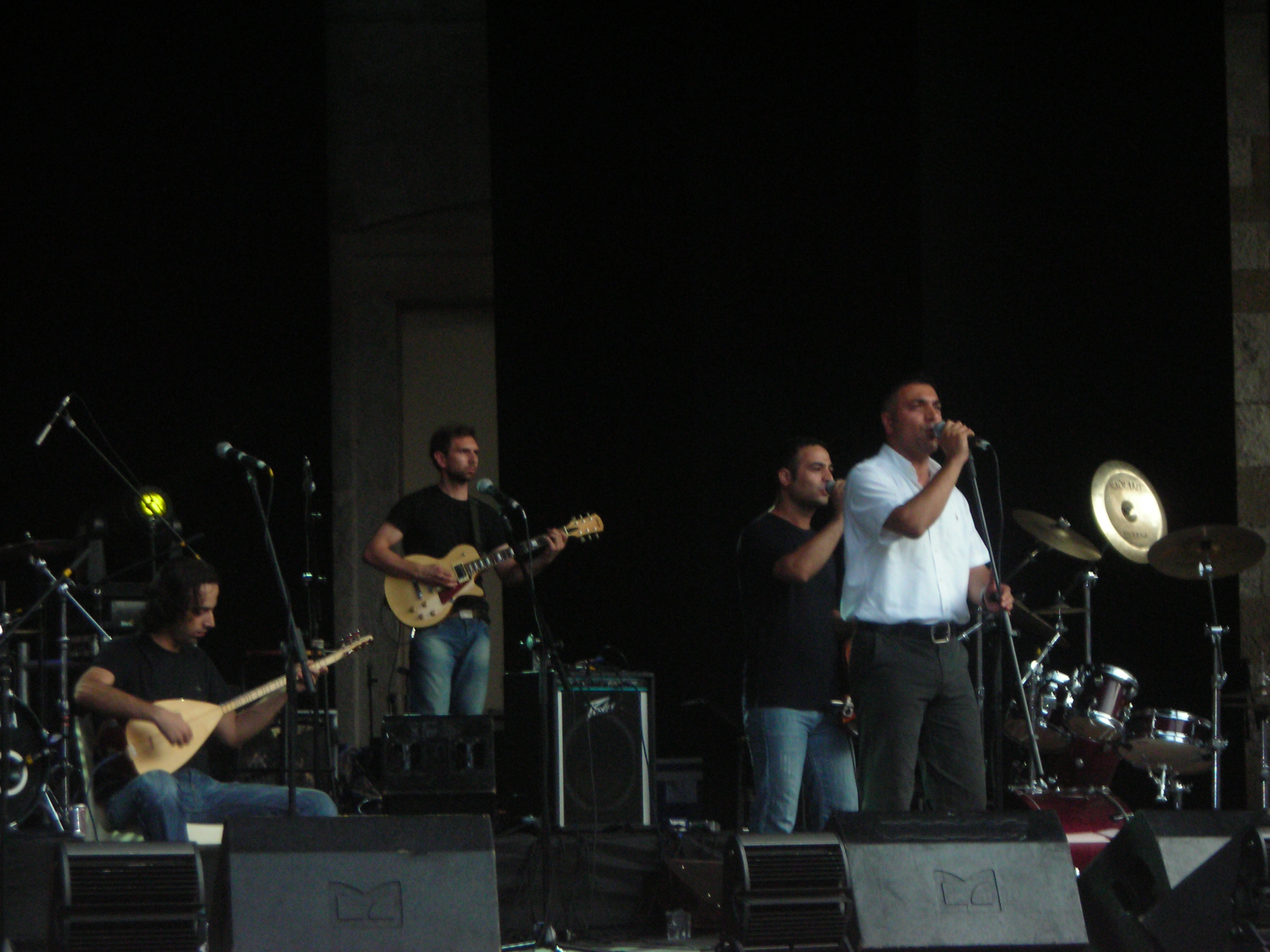 Agirê Jiyan konseri, 3 Temmuz 2009, Istanbul